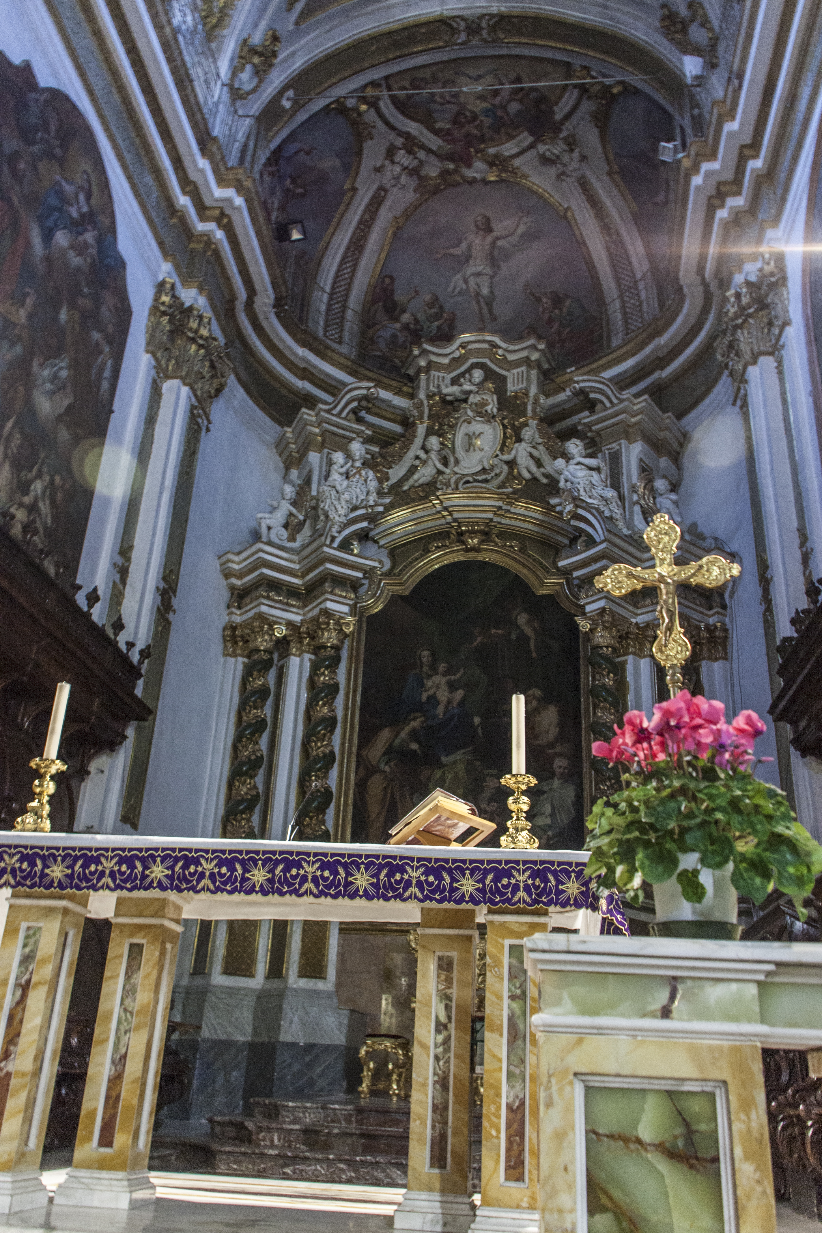 Basilica di Santa Maria Maggiore (interno)